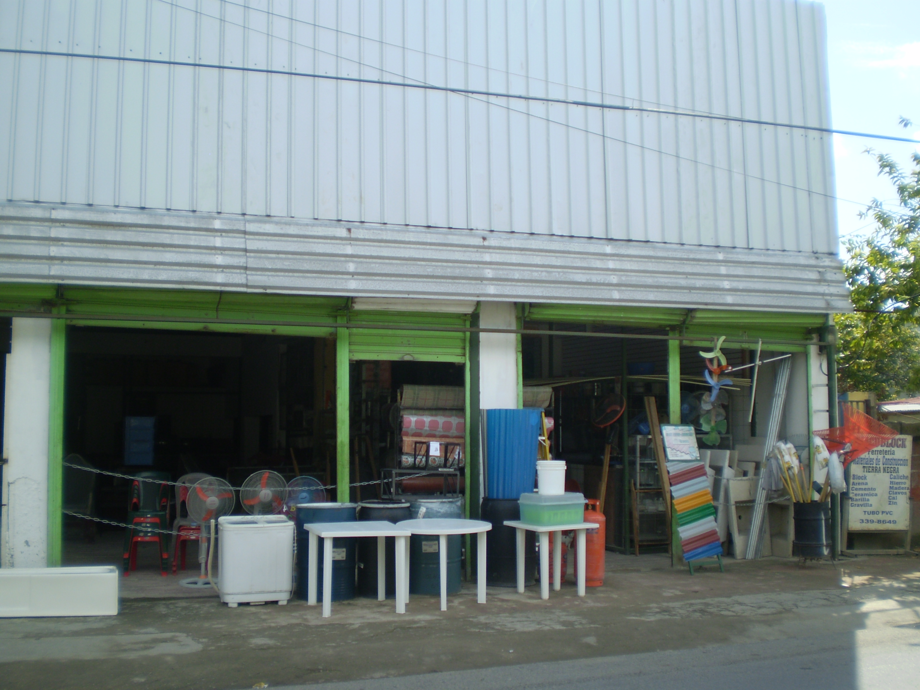 villa progreso san pedro